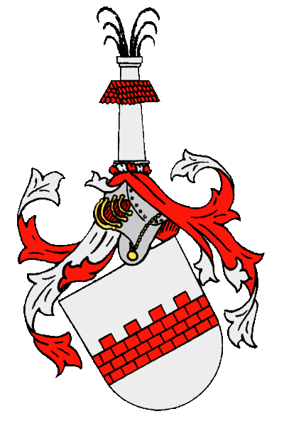 Slekten Zieglers stamvåpen fra 1400-tallet.